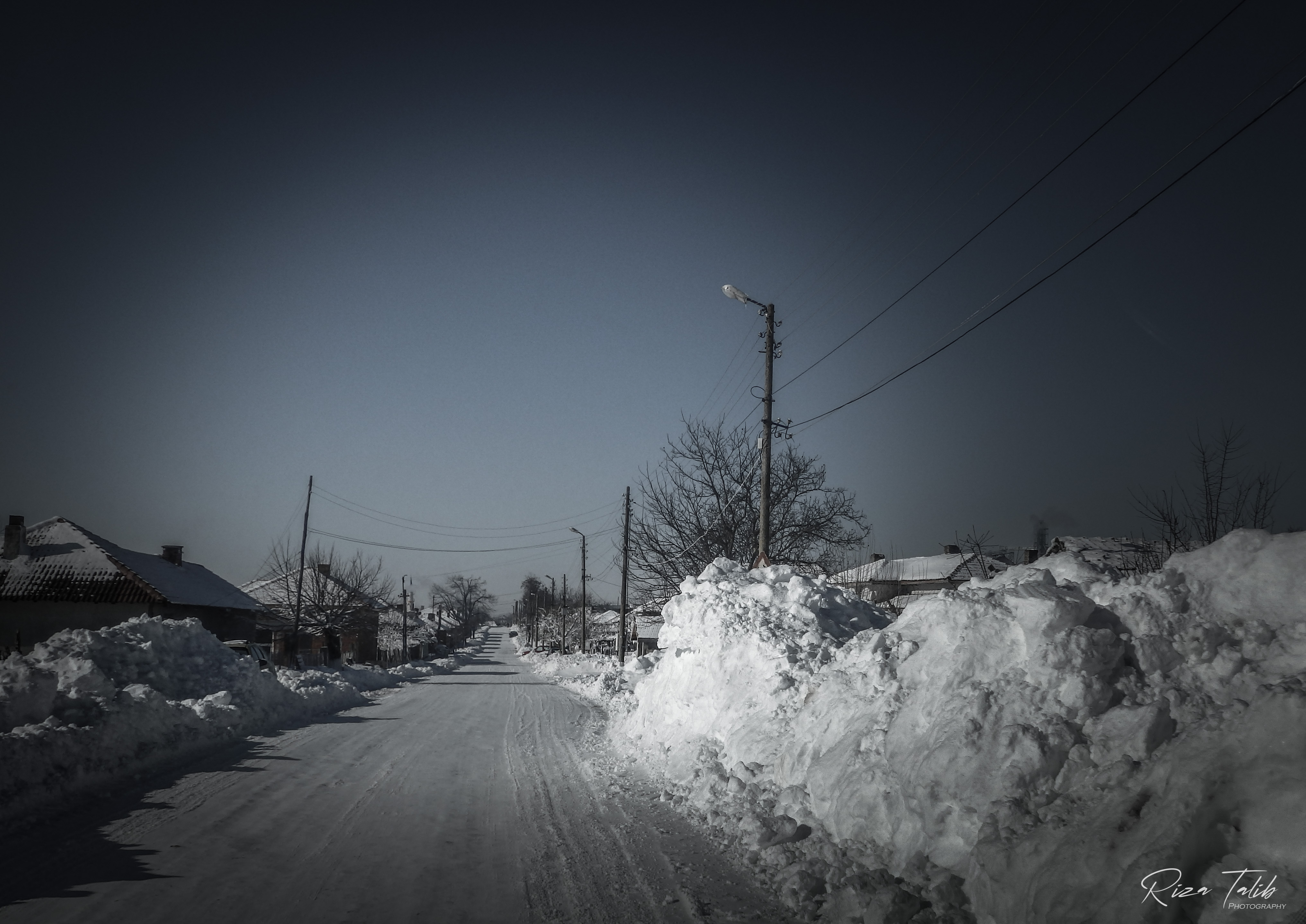 Снежна буря в селото